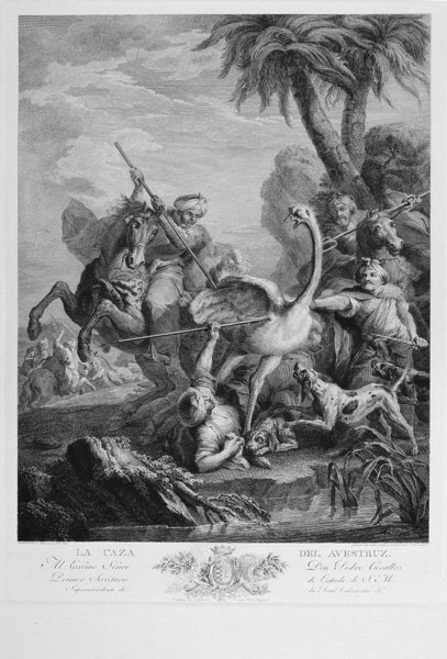 Blai Ametller- Pasqual Pere Moles- Carle Vanloo- La Caça de l'estruç